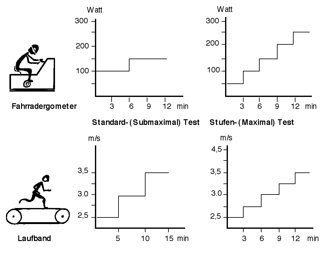 Schematische Darstellung von Standard- und Stufentest